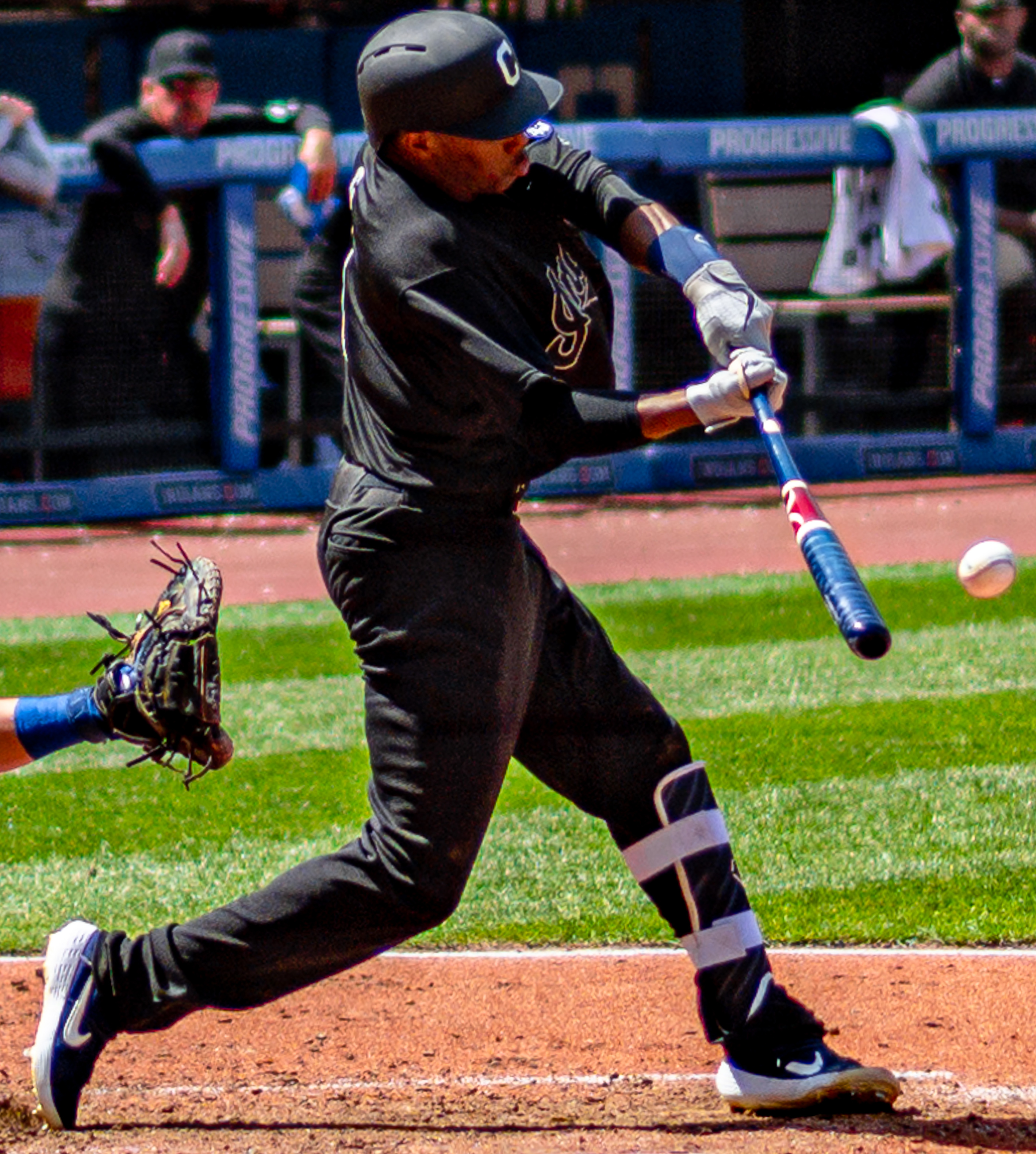 Greg Allen